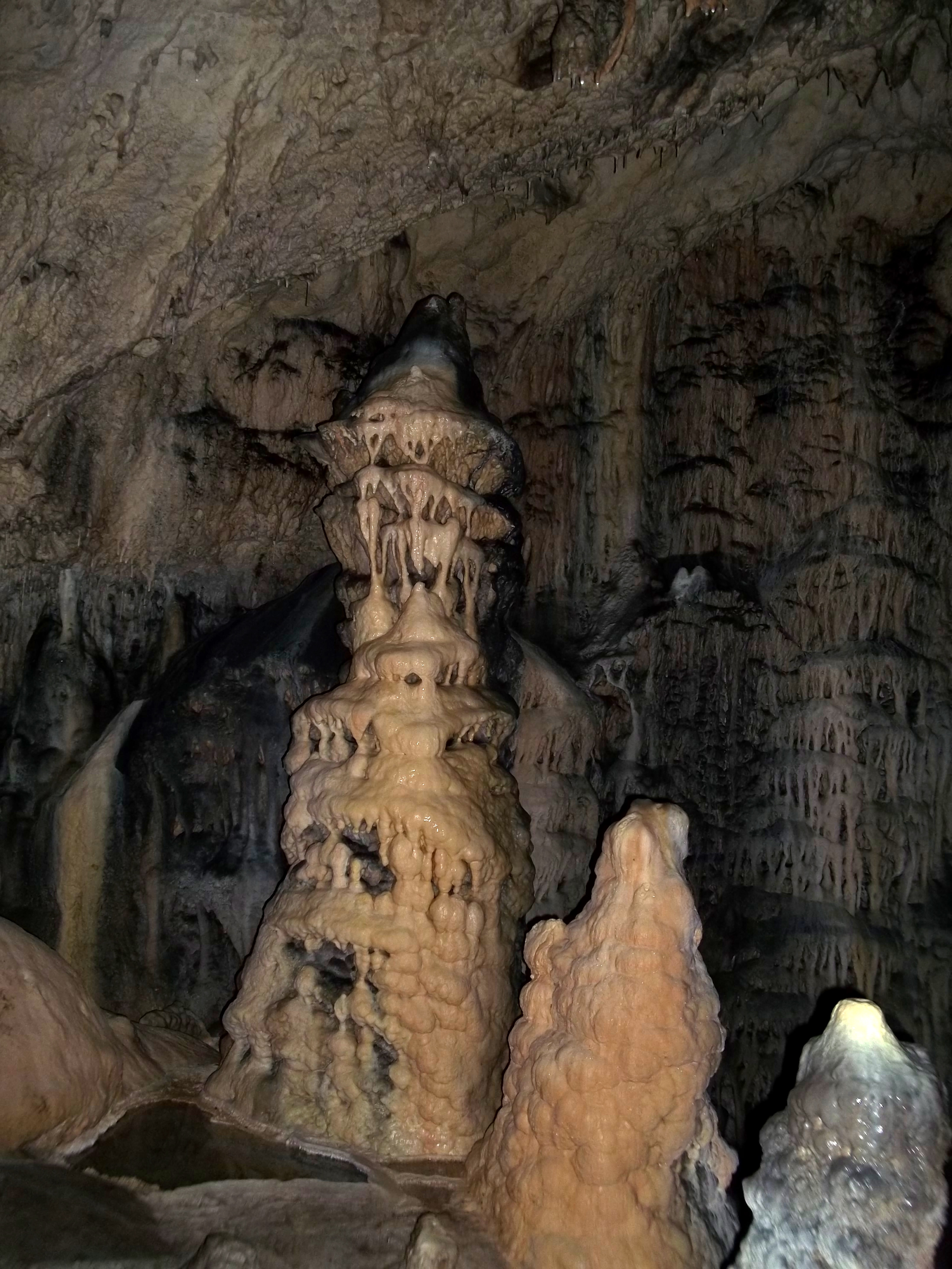 Srpski (latinica): Pećina Banj Stijena (Mračna pećina)